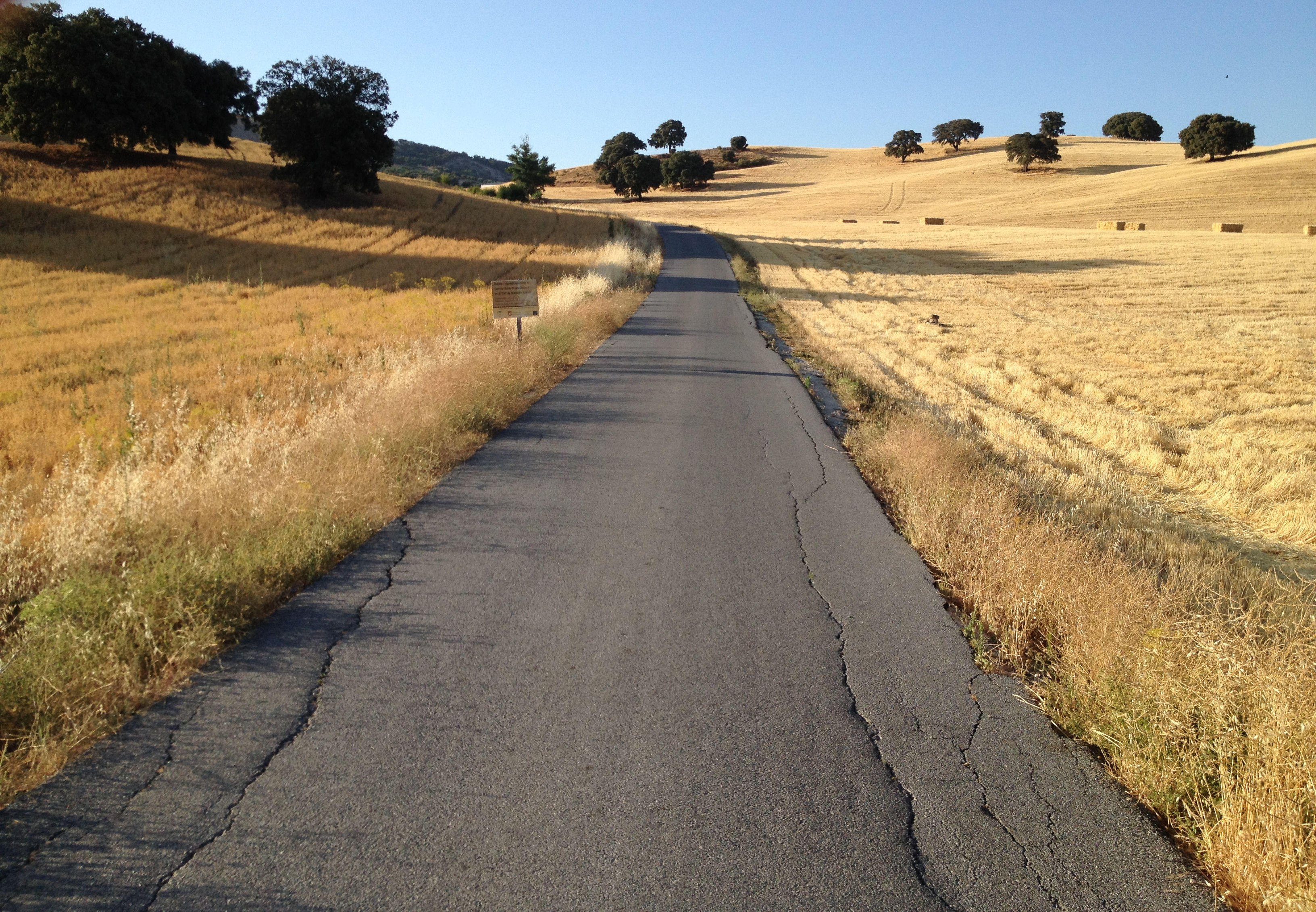 Tramo de la antigua Cañada Real de Almedinilla a Íllora, el cual conecta Venta de Agramaderos con la carretera GR-3410. También es conocido como Camino de Priego.